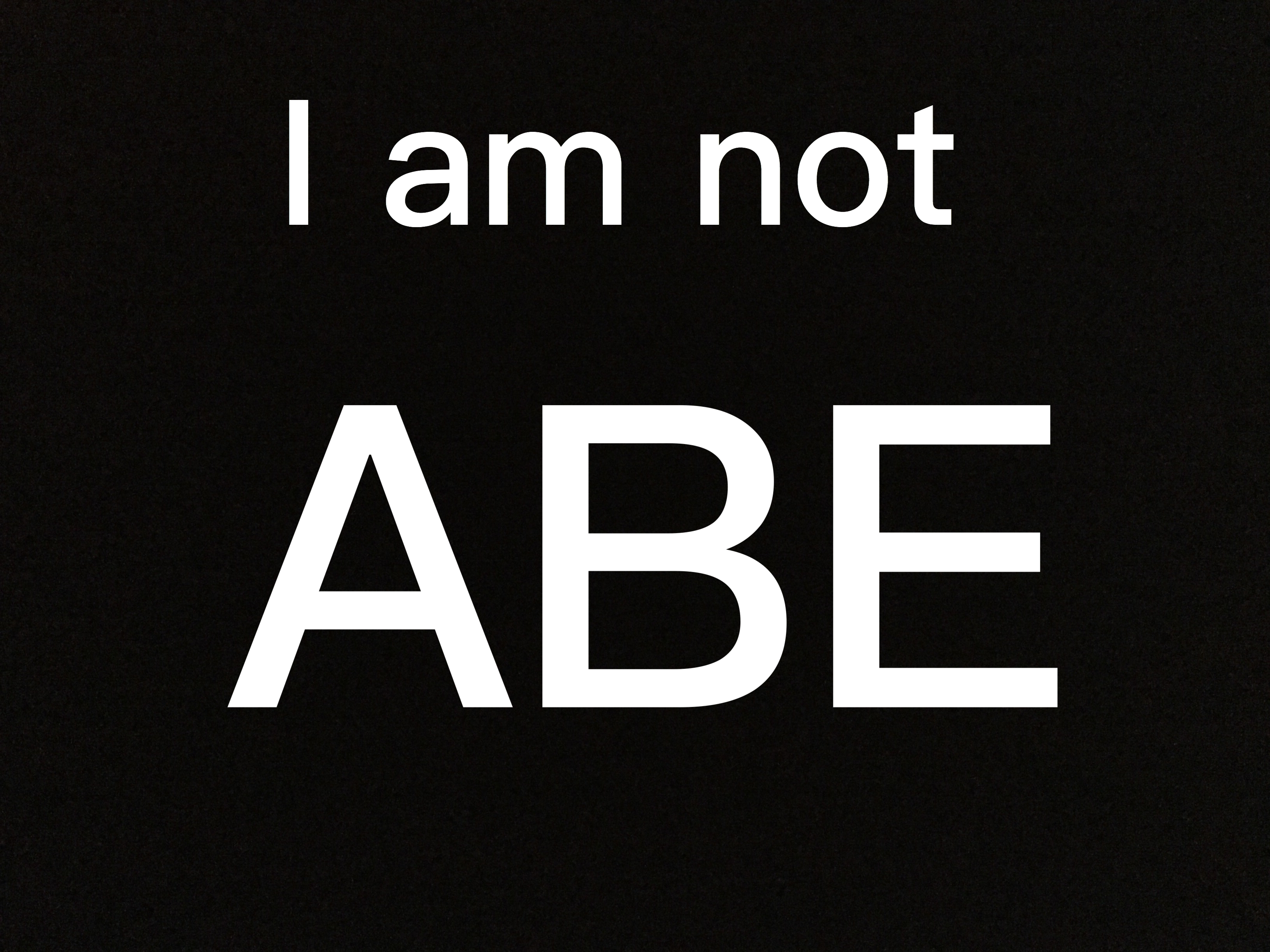 プラカードの再現